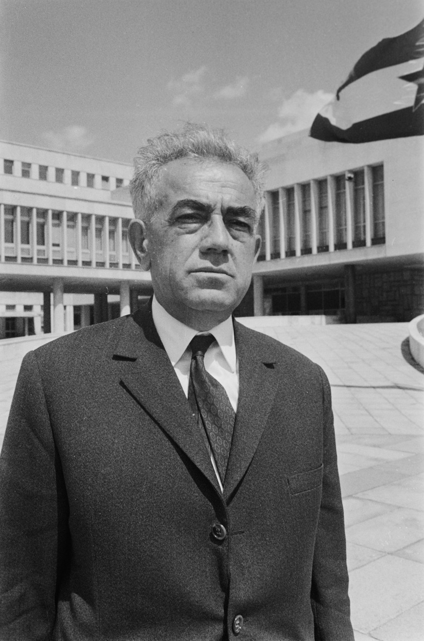 Jovan Veselinov (1906 — 1982), učesnik Narodnooslobodilačke borbe, društveno-politički radnik SFRJ i SR Srbija, junak socijalističkog rada i narodni heroj Jugoslavije. foto:Stevan Kragujević (po odobrenju kćerke Tanje Kragujević)